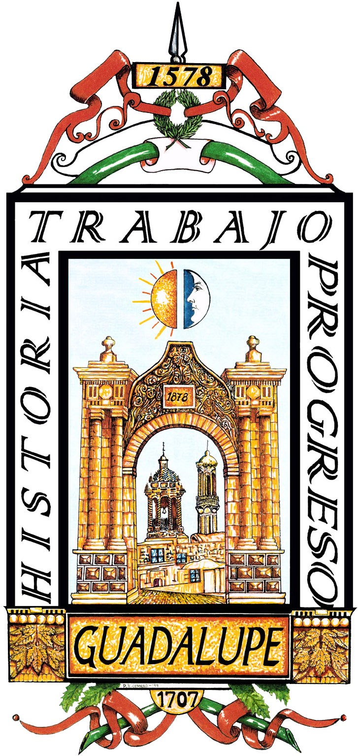 ESCUDO DEL MUNICIPIO DE GUADALUPE, ZACATECAS, MÉXICO.